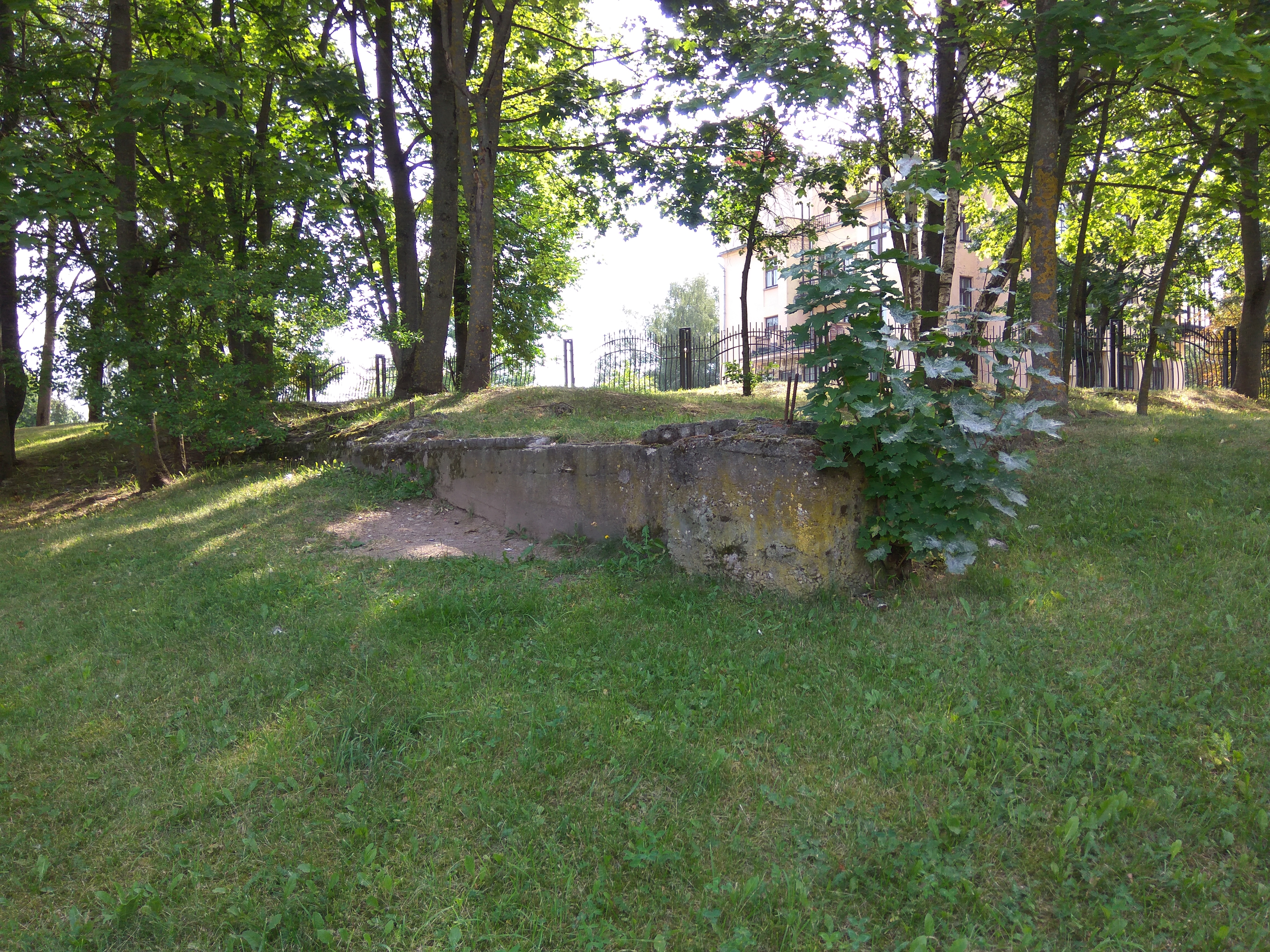 Мінск. Метэаралігічная станцыі і наваколлі